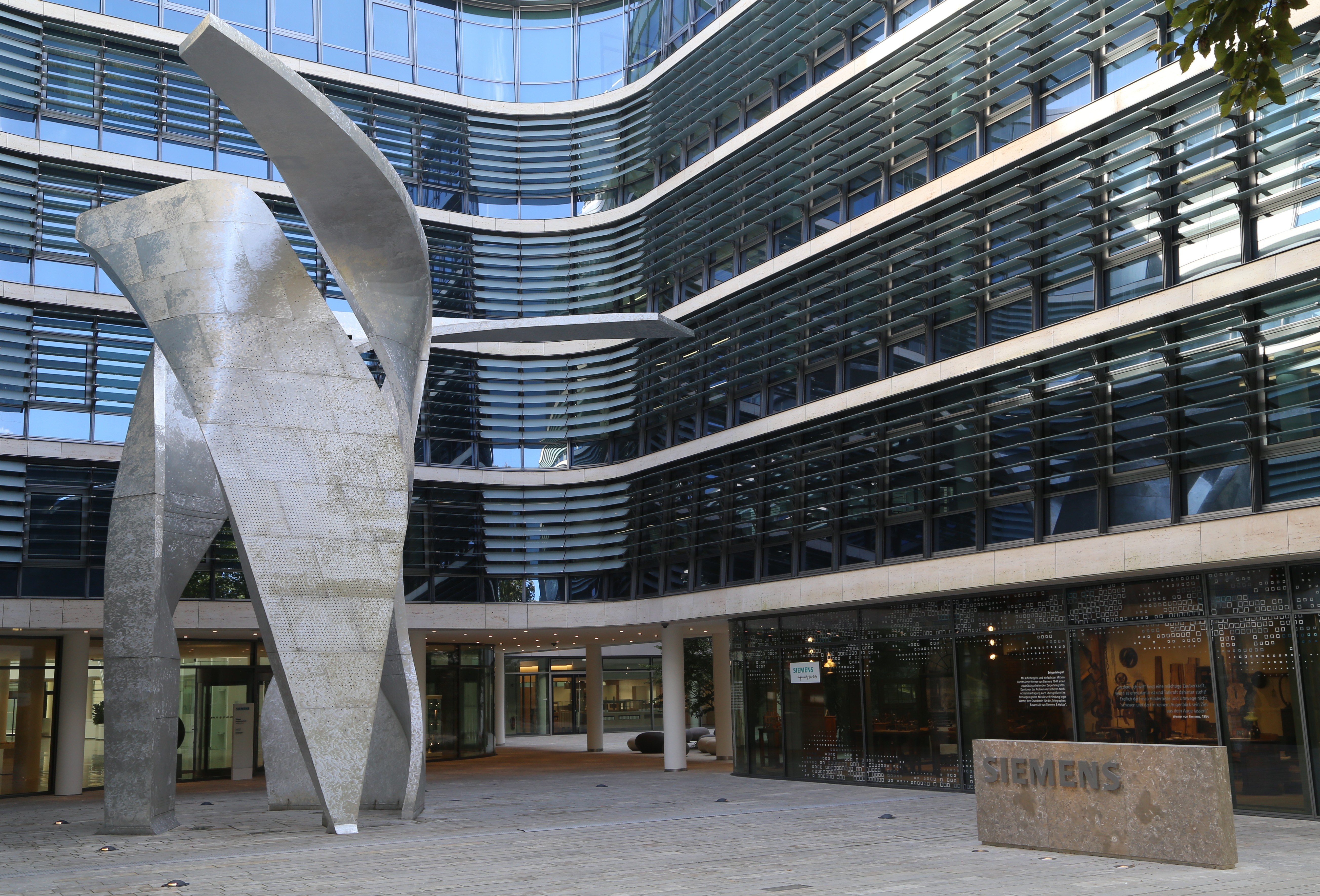 The Wings created by Studio Libeskind, Werner-von-Siemens-Straße, München, Siemens Konzernzentrale